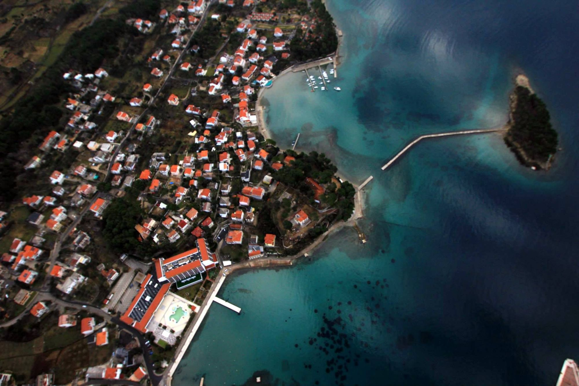 My friends skydivers jump in Rab